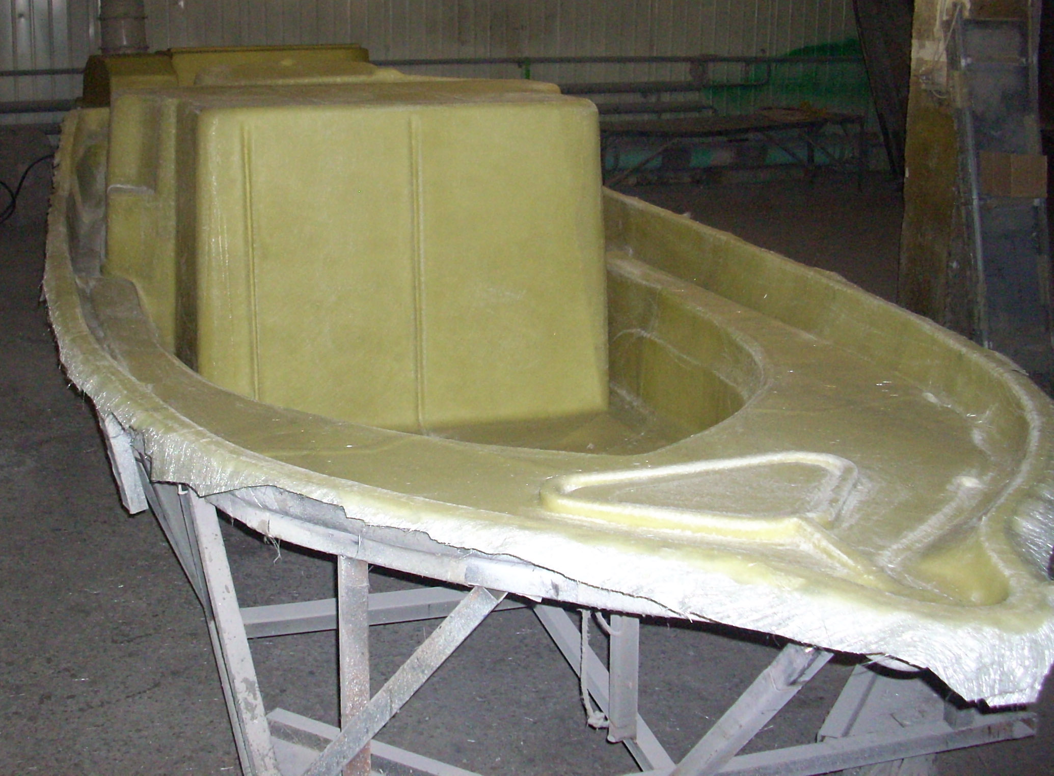 Верхняя часть лодки из стеклопластика.